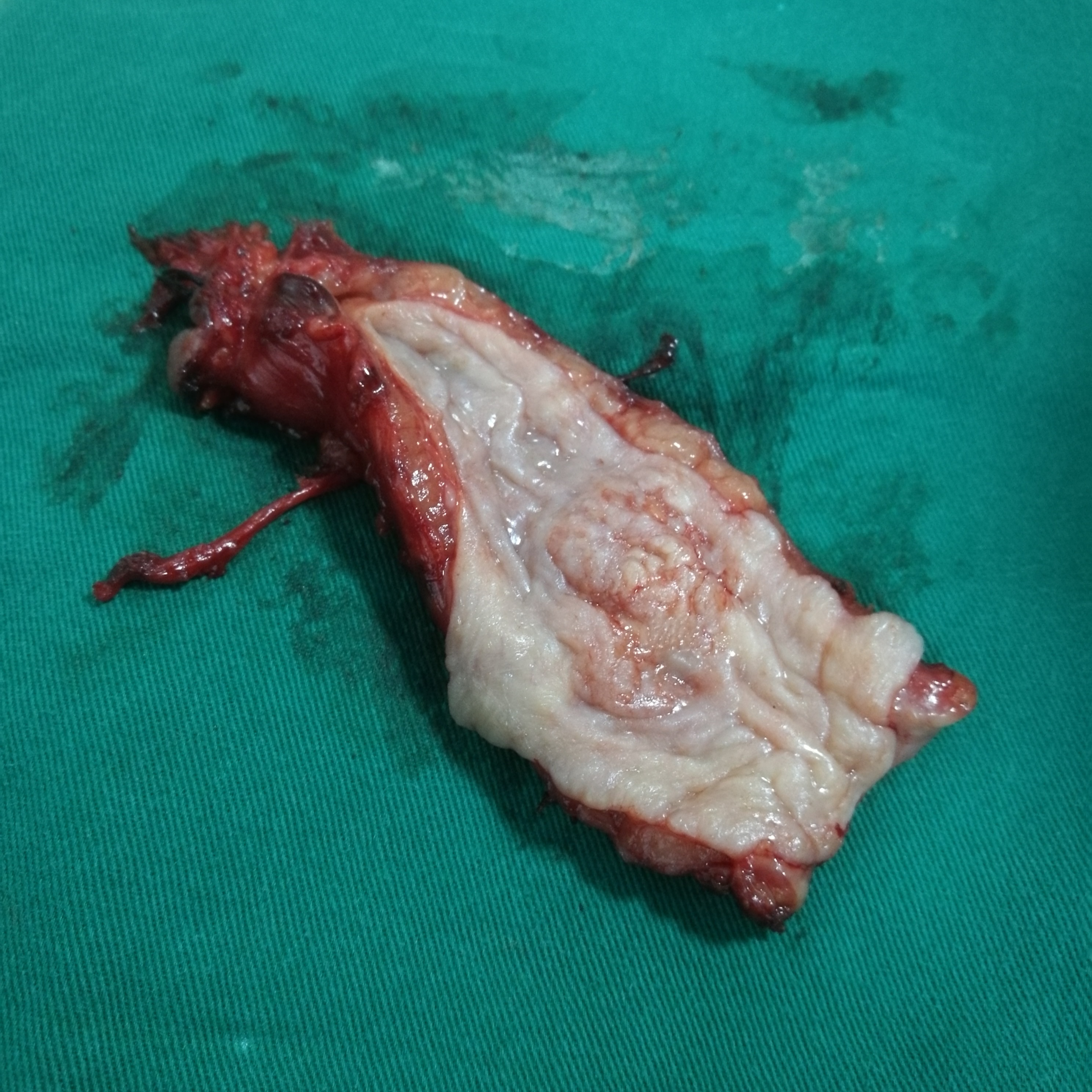 中文（中国大陆）: 食道癌肿瘤标本